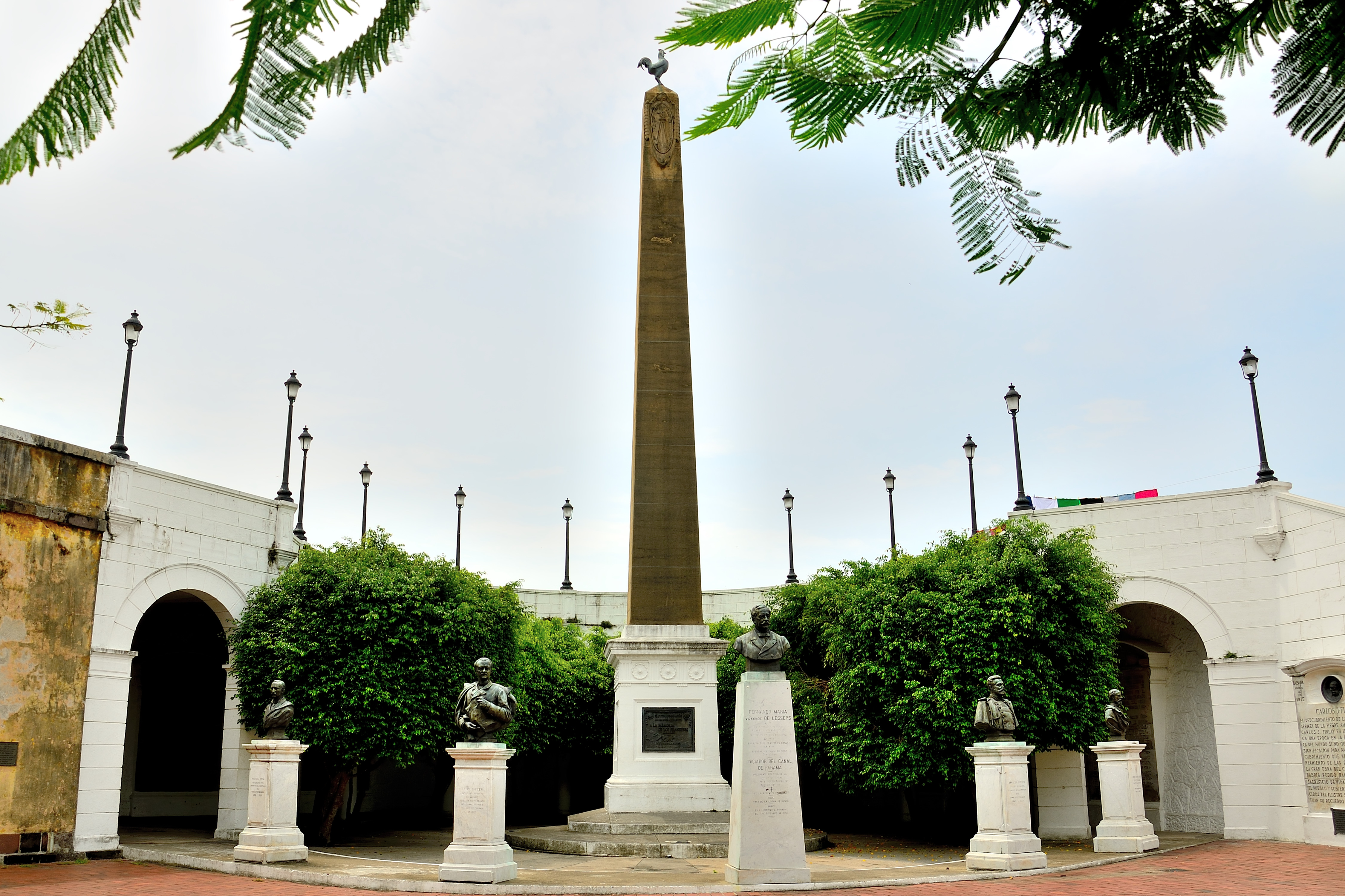 Plaza de Francia, en honor a los franceses que iniciaron la construcción del Canal de Panamá.